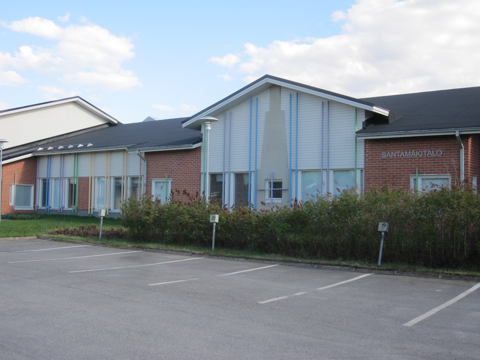 Kempeleen Santamäen asuinalueella sijaitsevan Santamäkitalon julkisivu Peltomiehentieltä katsottuna.